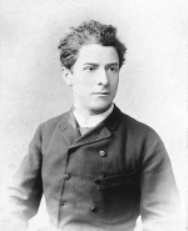 Krecsányi Ignác magyar színész, színházigazgató.